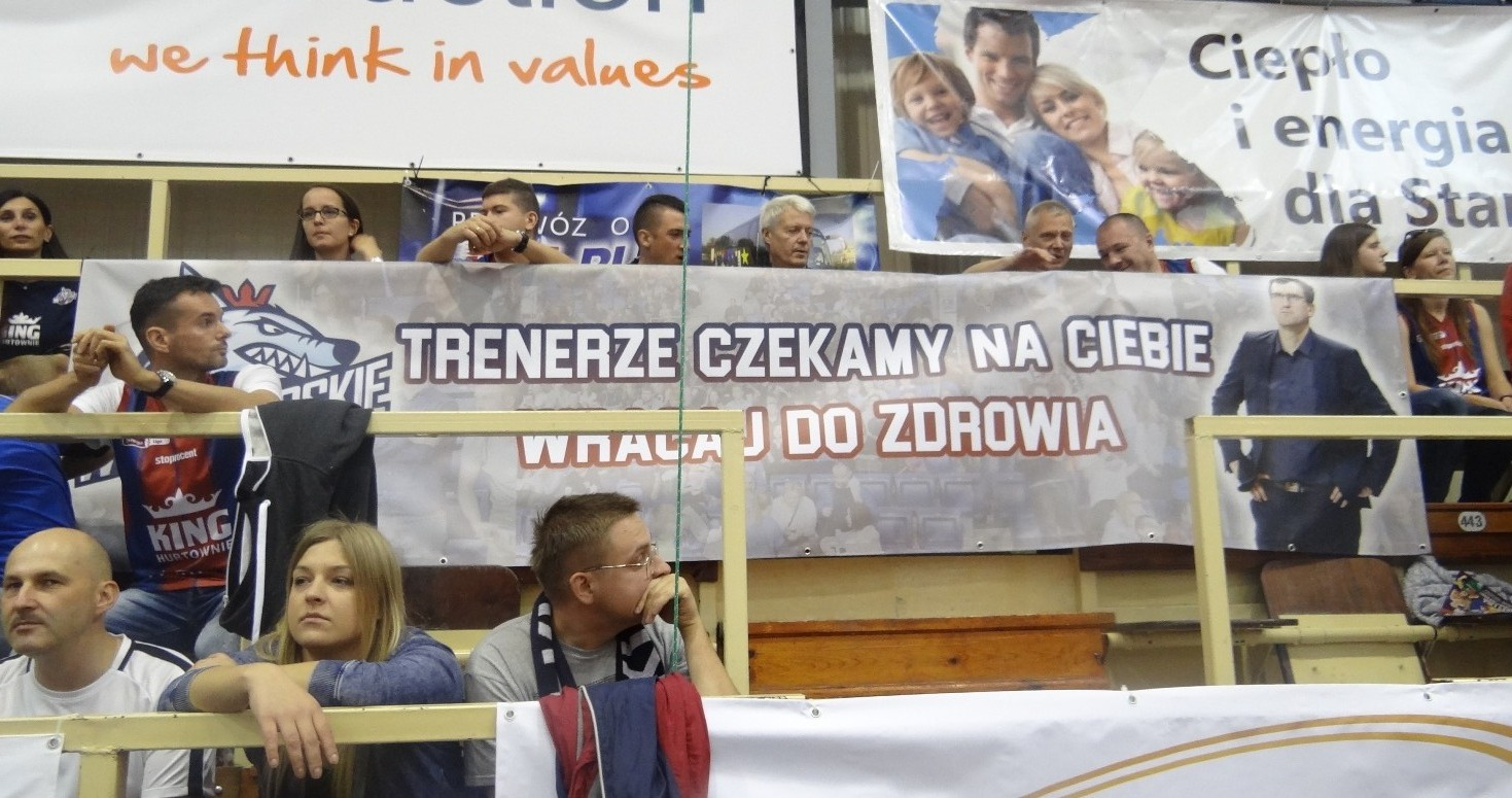 Kibice Kinga Szczecin czekają na powrót trenera (06.10.2018)